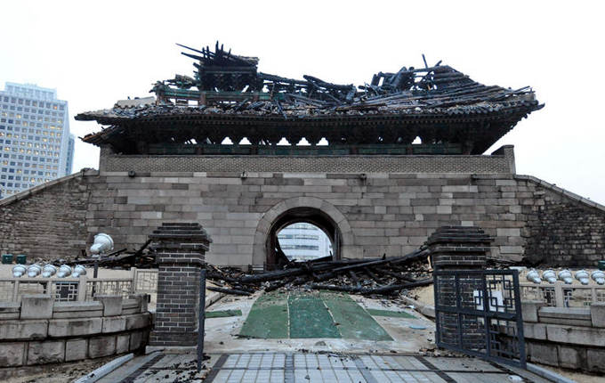 2008년 2월 10일 밤에 발생한 화재로 인해 붕괴된 숭례문